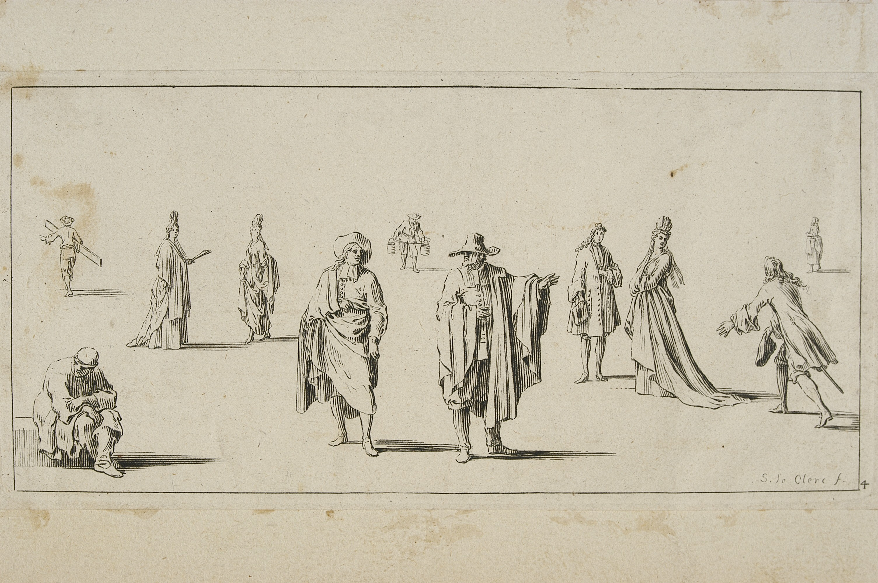 Diverses suites de figures